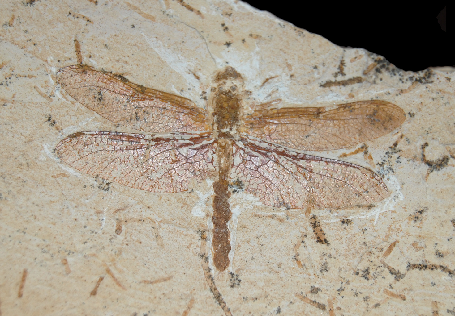 Naturhistorisches Museum Wien